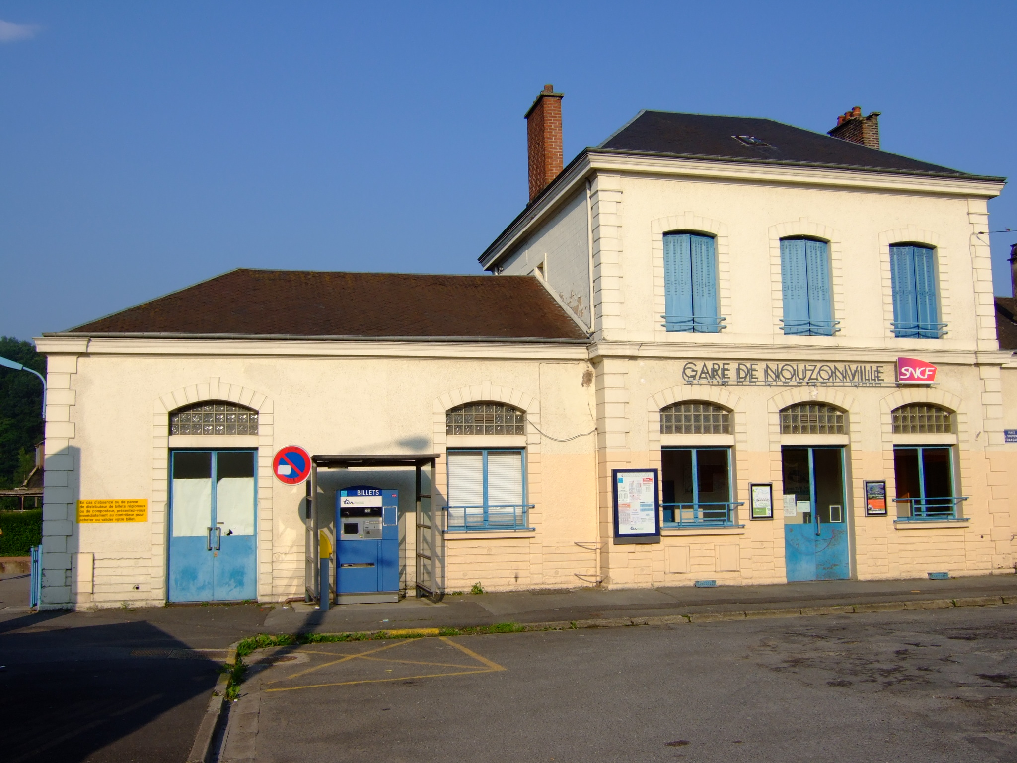 La gare de Nouzonville